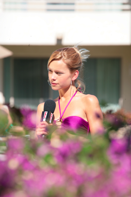 Modelo y Presentadora